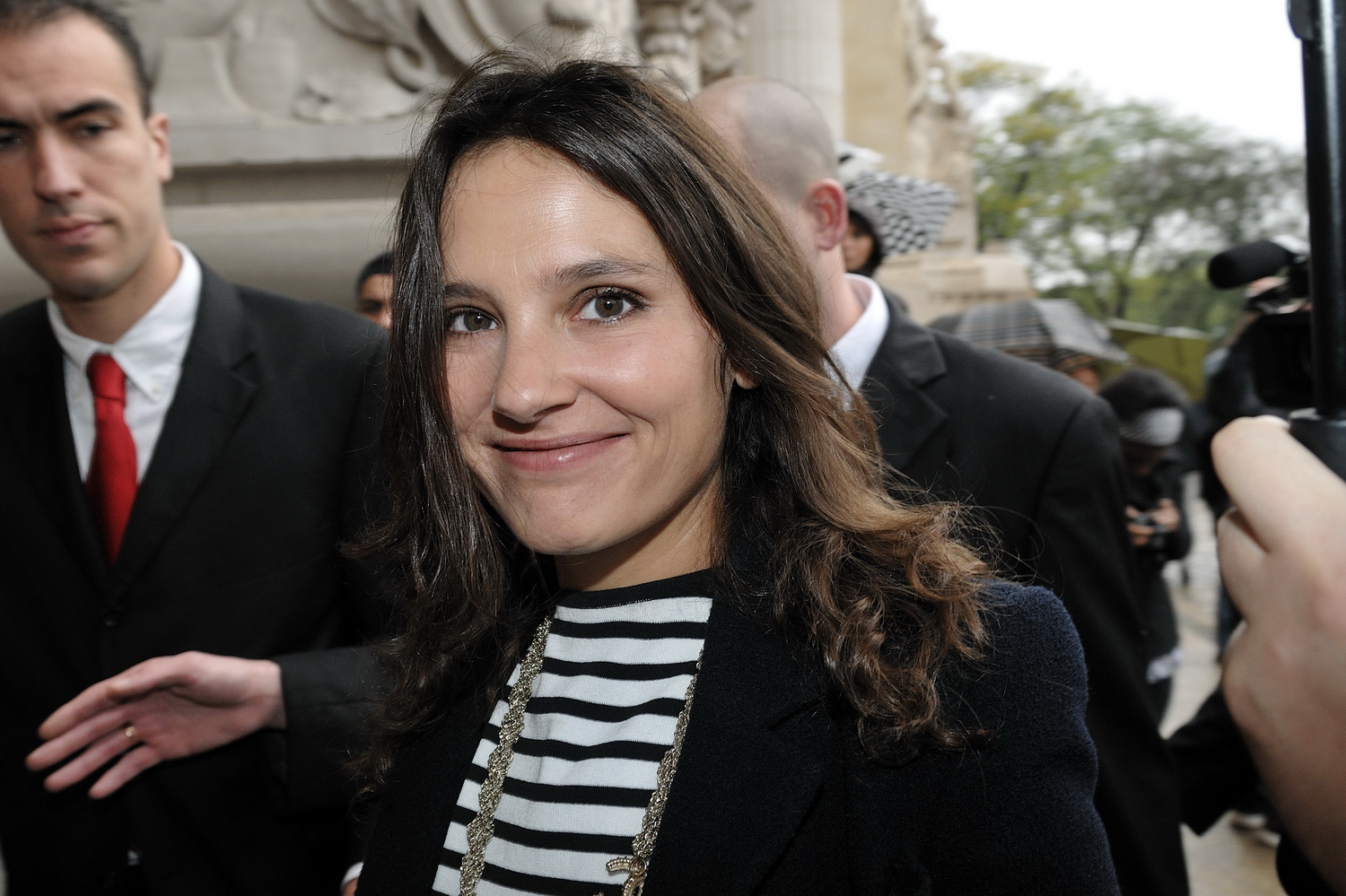 Défilé Channel printemps/été 2010 prêt-à-porter au Grand Palais (Avenue du Général Eisenhower - Paris 75008) Karl Lagerfeld a fait fort, en transformant le Grand Palais en étable géante. Des People en pagaille emmenés par Lily Allen (ambassadrice de la ligne Coco Cocoon) suivi de Bernadette Chirac, Claudia Schiffer, Rihanna, Virginie Ledoyen, Anna Wintour, Sean Lennon et Charlotte Kemp Muhl, Marie-Josée Croze, Prince accompagné de sa fiancée, et Irina Lazareanu, l'ex de Pete Doherty.